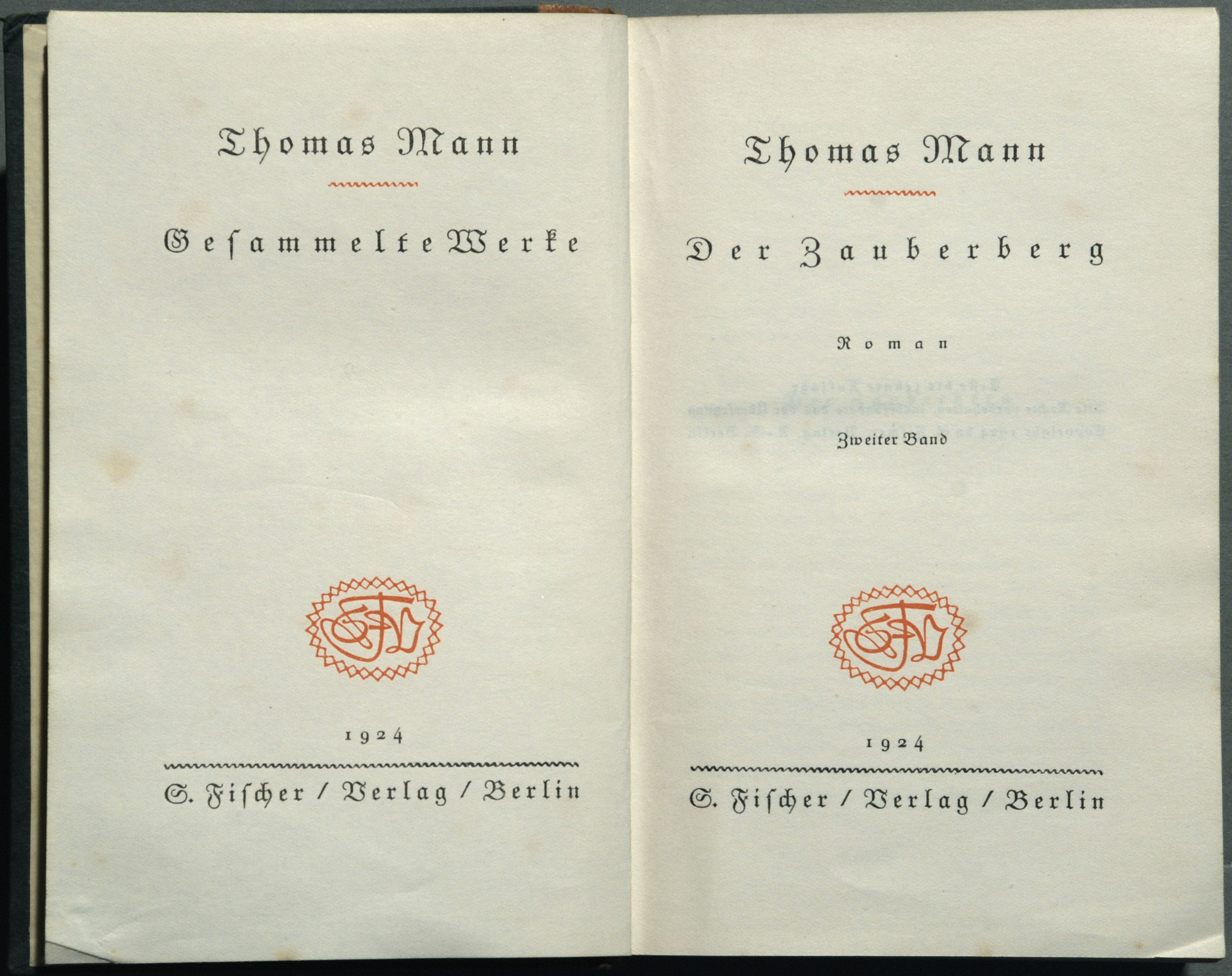 Thomas Mann: Der Zauberberg. Roman. Titelblatt des Erstdrucks.